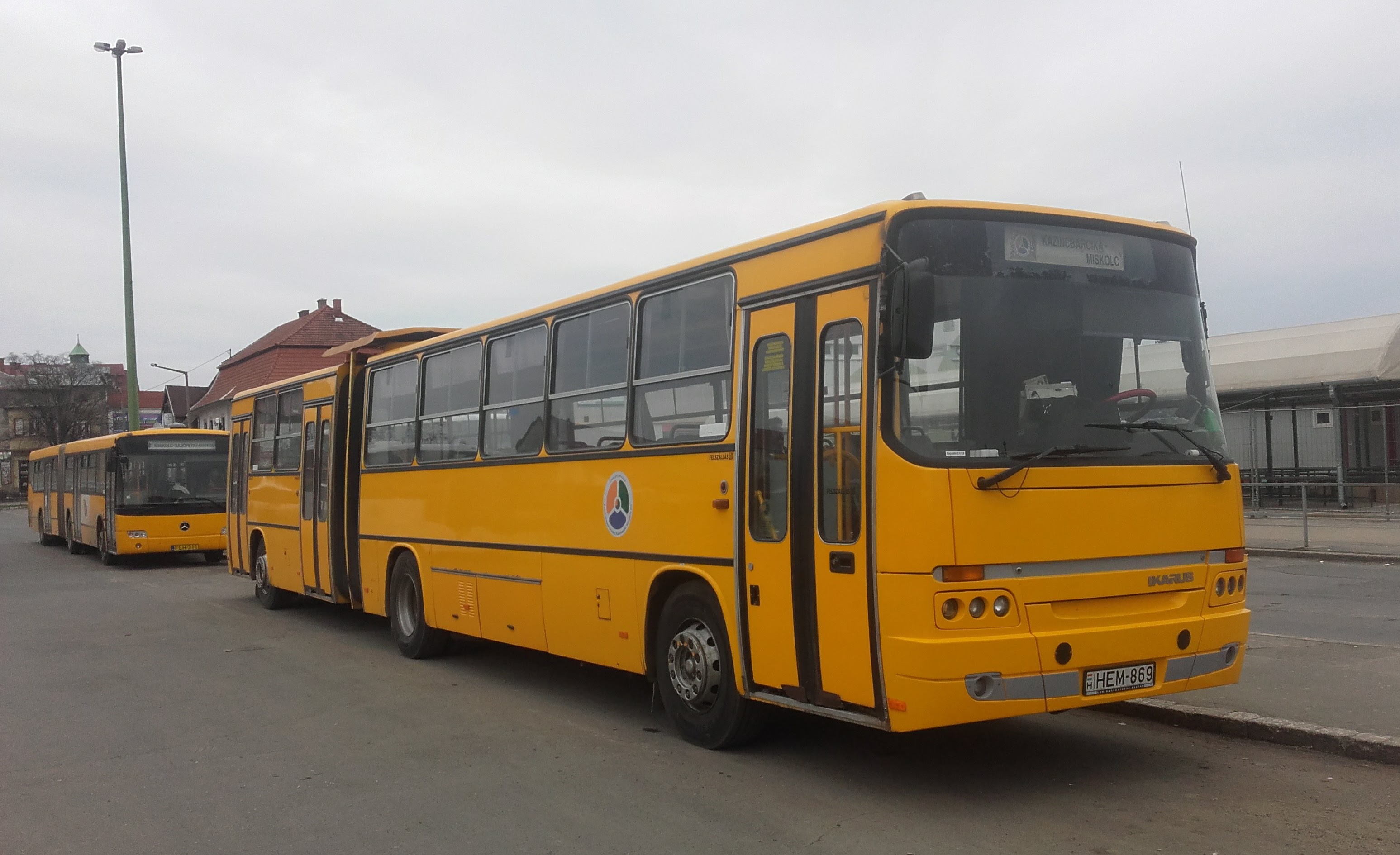 Az ÉMKK HEM-869 rendszámú Ikarus C80 típusú busza Miskolcon, a 3765-ös helyközi járaton.